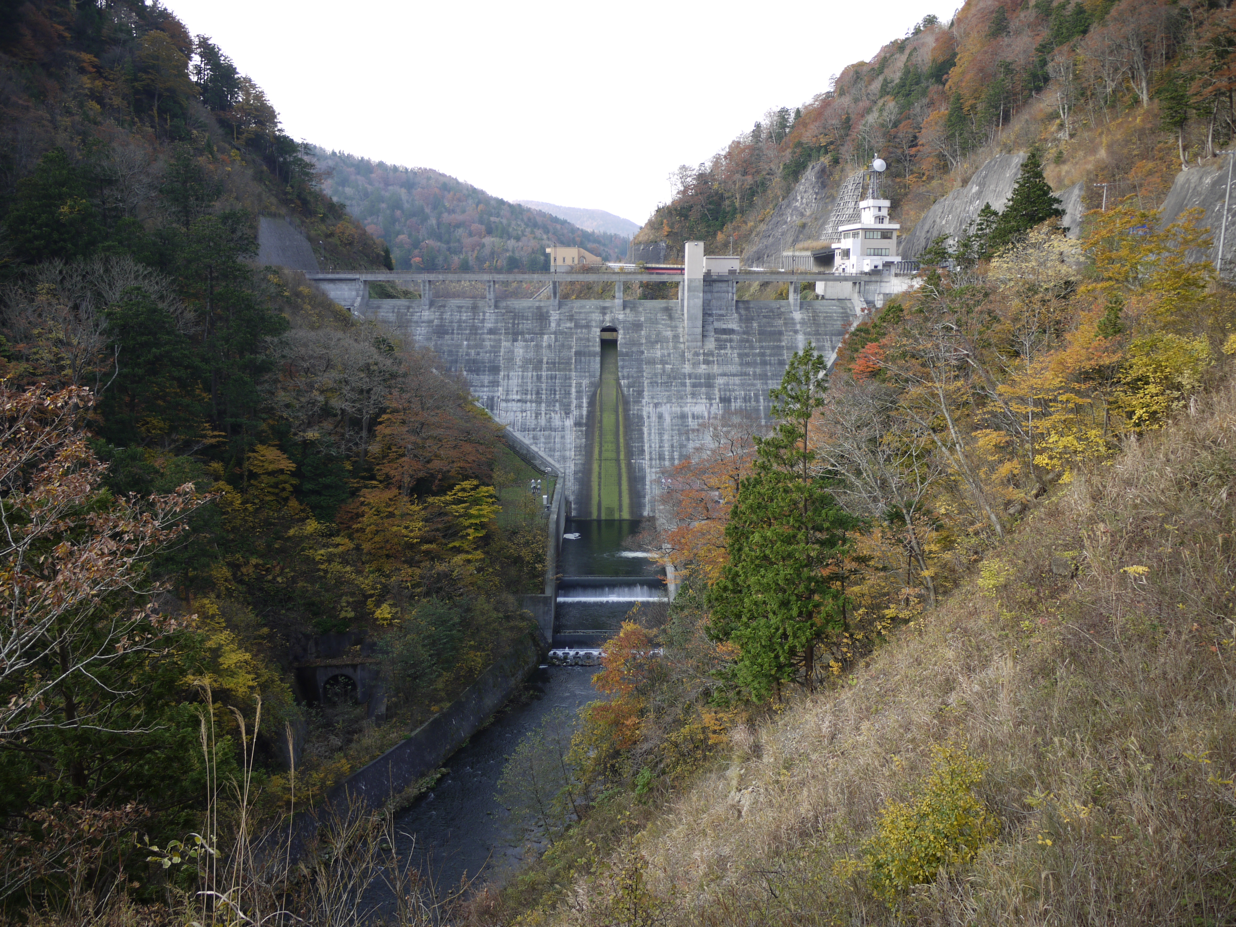 川内ダム ダム堤体